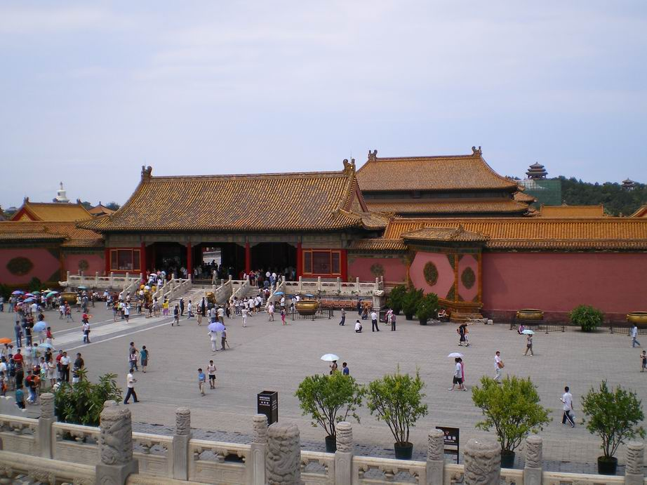 העיר האסורה, בייג'ינג רישיון נוצר על ידי משתמש:Gsella